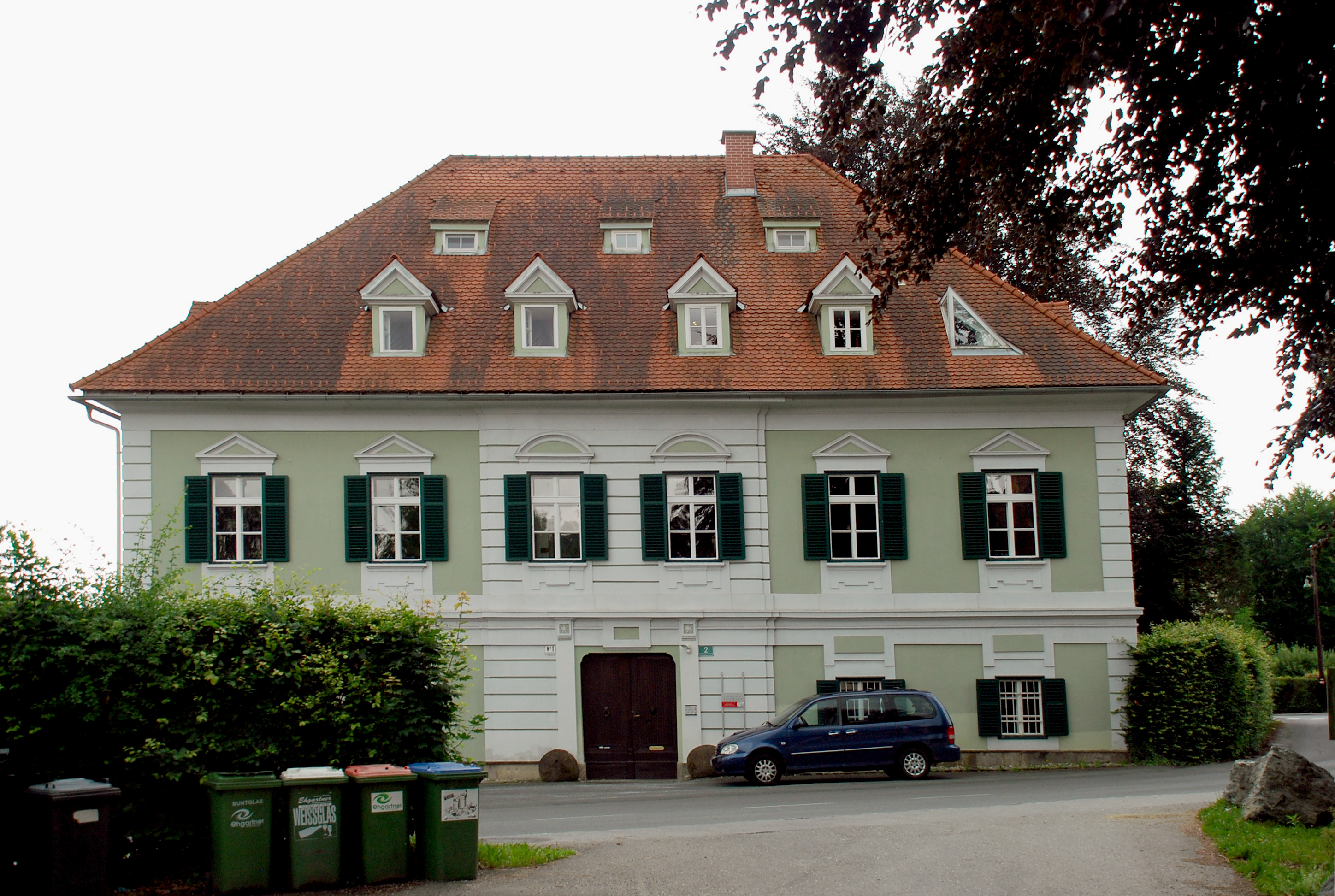 Deutschlandsberg, Steiermark, Österreich: Schloss Feilhofen